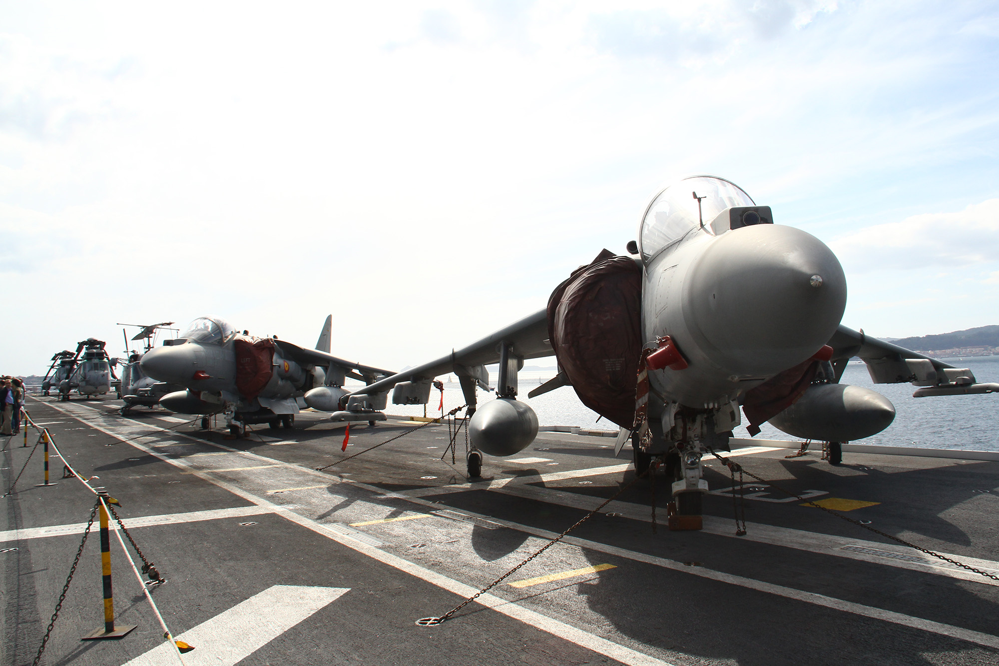 El portaaeronaves "Juan Carlos I" L-61 en Vigo El portaaeronaves "Juan Carlos I" L-61, buque insignia de la Armada Española, en su visita a Vigo el 3 de junio de 2017, con ocasión del tercer centenario de la Real Compañía de Guardiamarinas. "Juan Carlos I" L-61 aircraft carrier in Vigo "Juan Carlos I" L-61 aircraft carrier, flagship of the Spanish Navy, in its visit to Vigo on June 3, 2017, on the occasion of the third centenary of the Royal Company of Guardiamarinas.